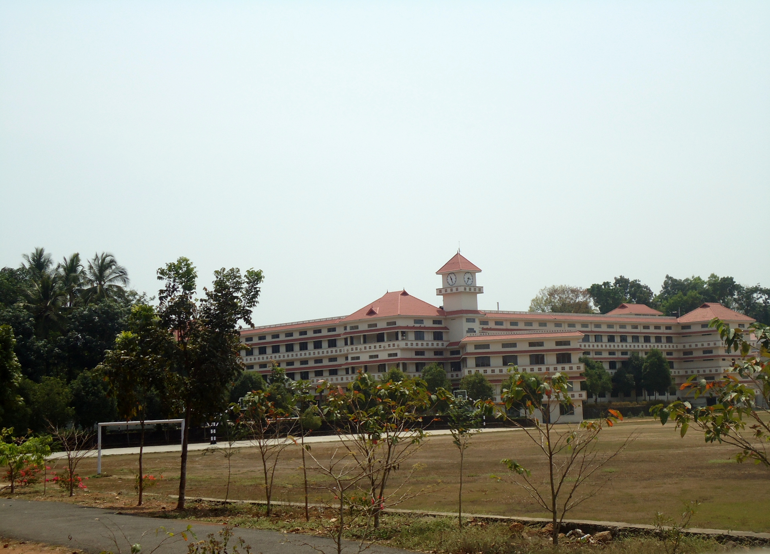 St Patrics Academy Manjapra